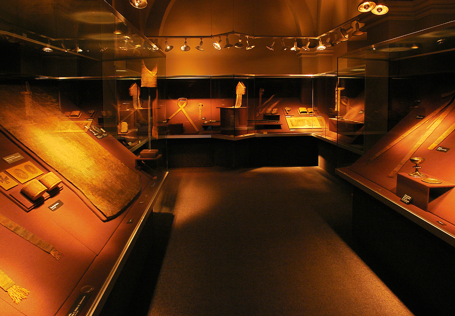 Bremer Dom (Museum): der abgedunkelte Textilraum. Hier werden auch die Grabungsfunde ausgestellt